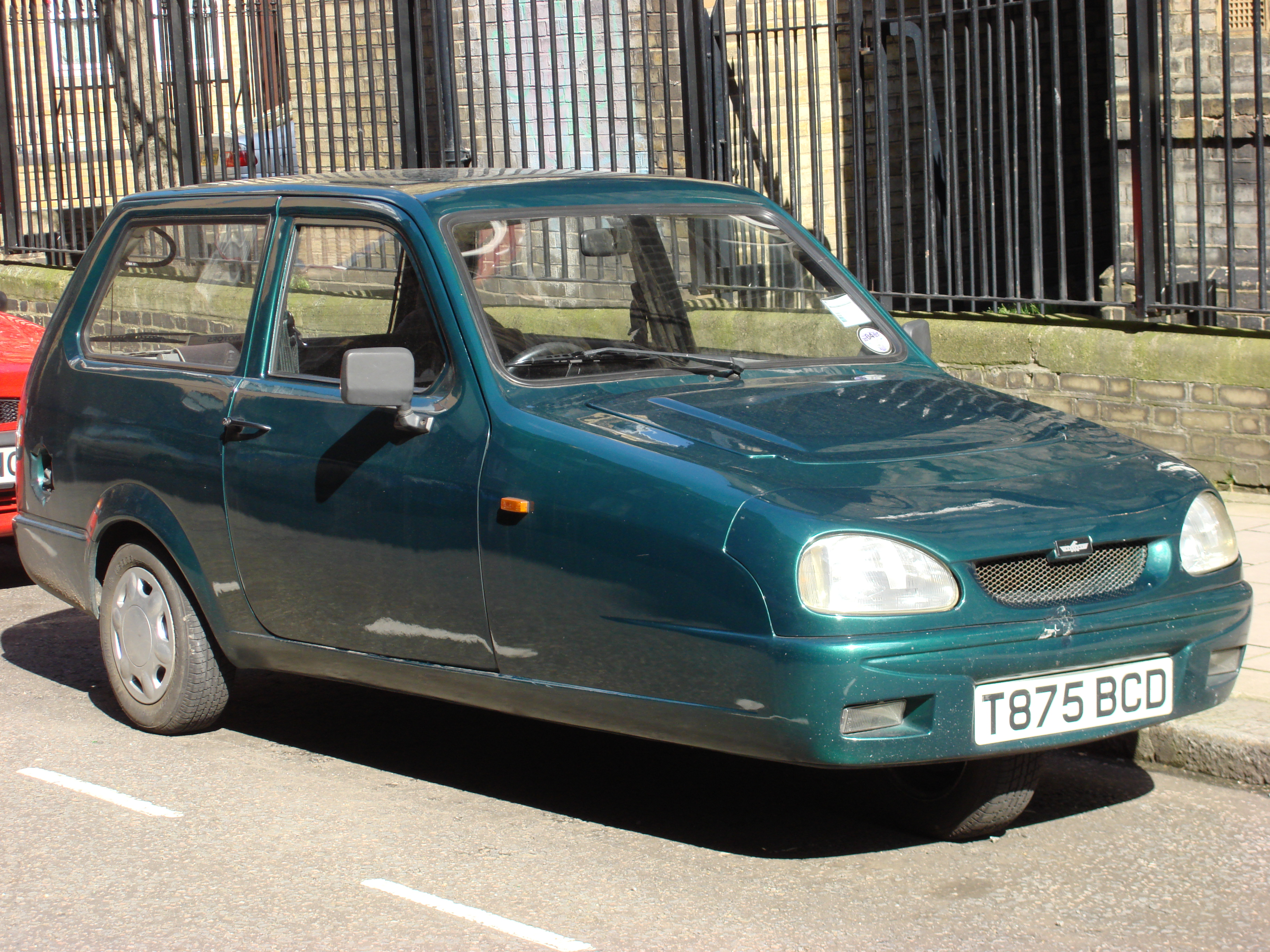 A green Reliant Robin.